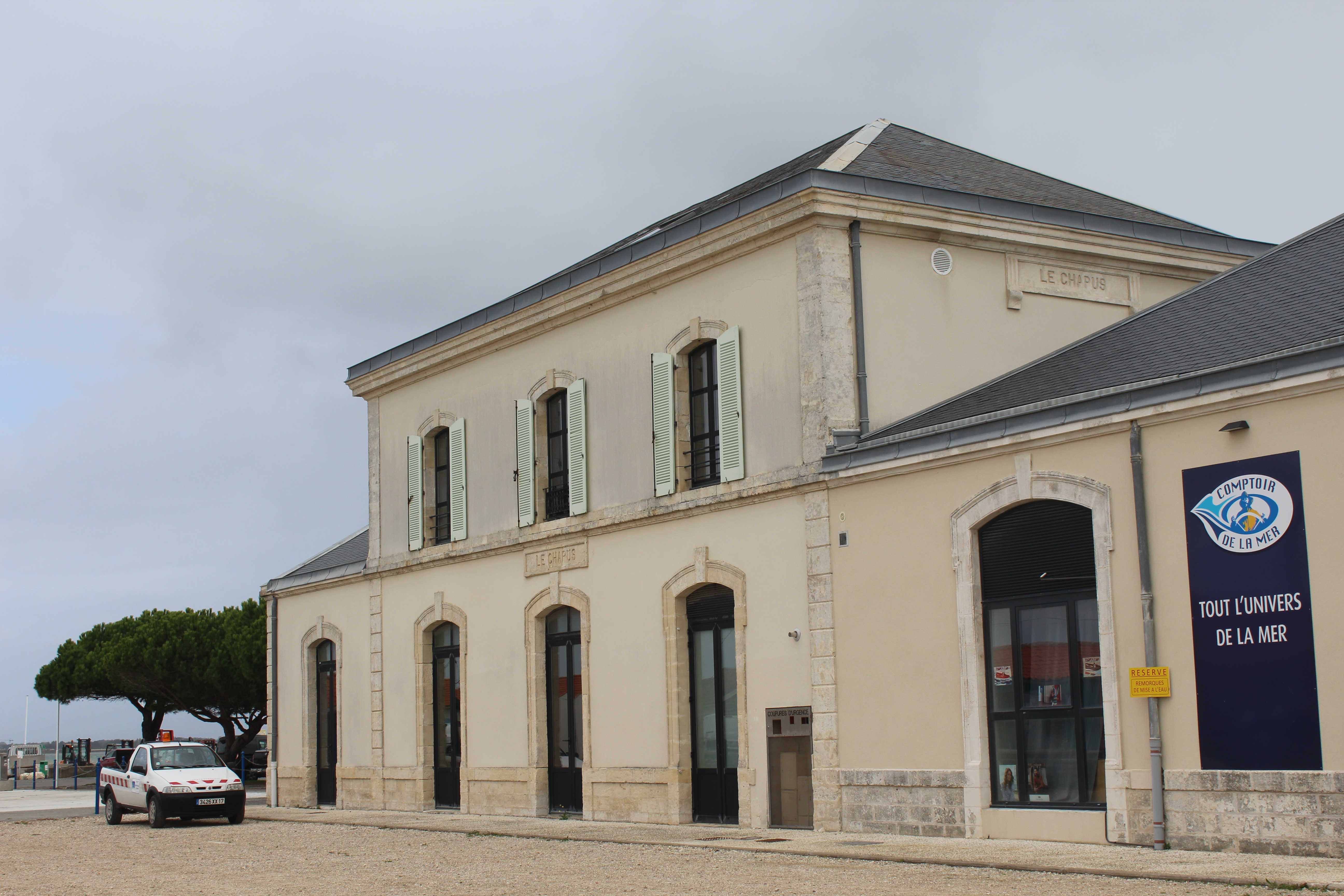 Ancienne gare du Chapus. Photo Oliver wileczelek